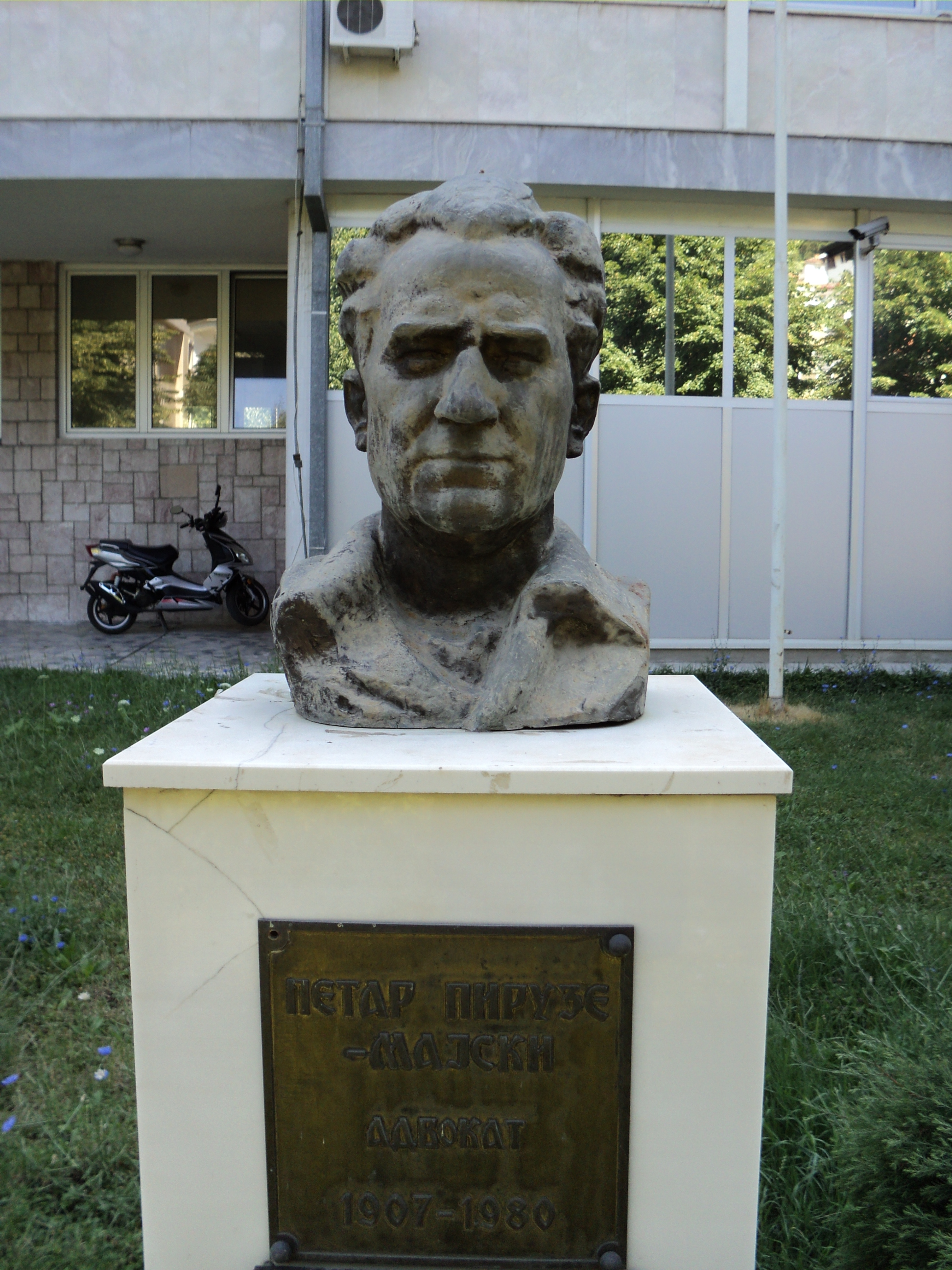 Bista Petra Piruzea u Ohridu. Jul 2011.